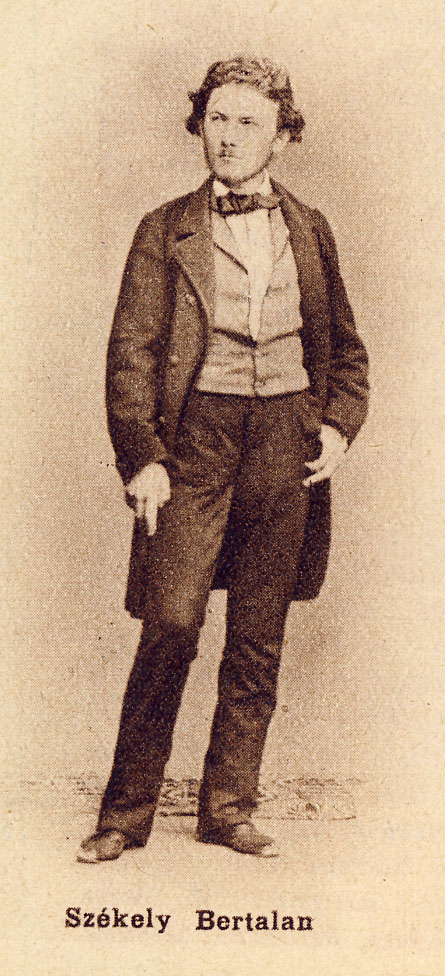 Székely Bertalan festőművész egész alakos képe.